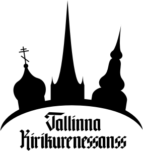 Tallinna kirikurenessansi programmi logo